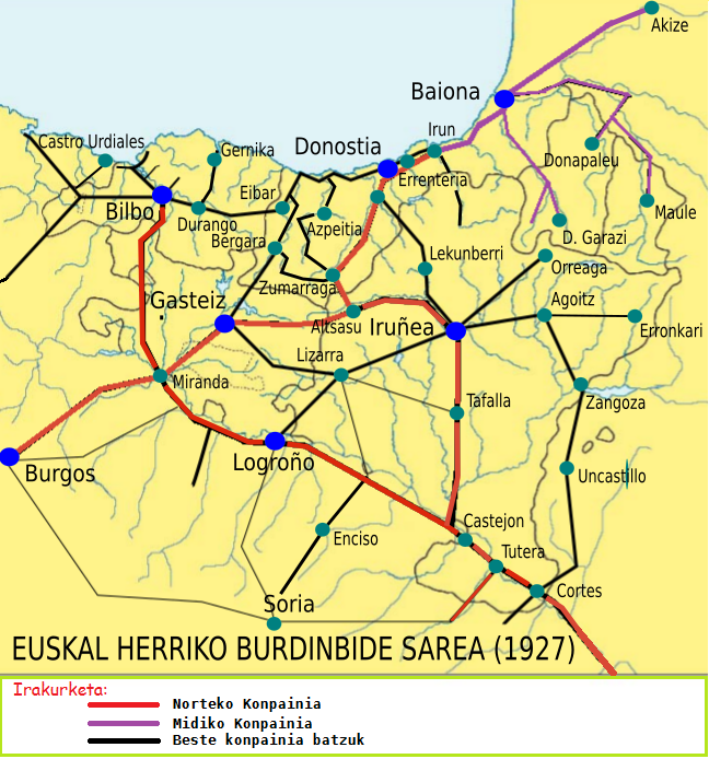 Euskal Herriko burdinbide sarea 1927an